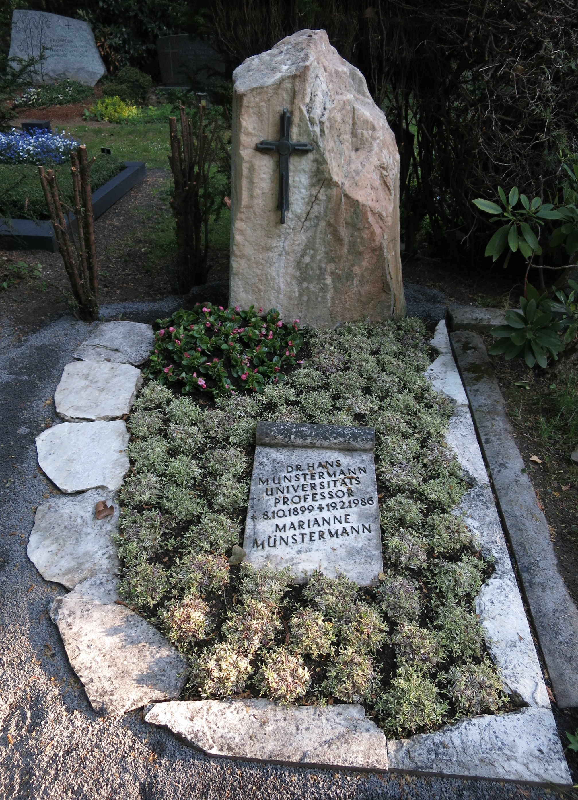 Hans Münstermann - Grab auf Friedhof Melaten